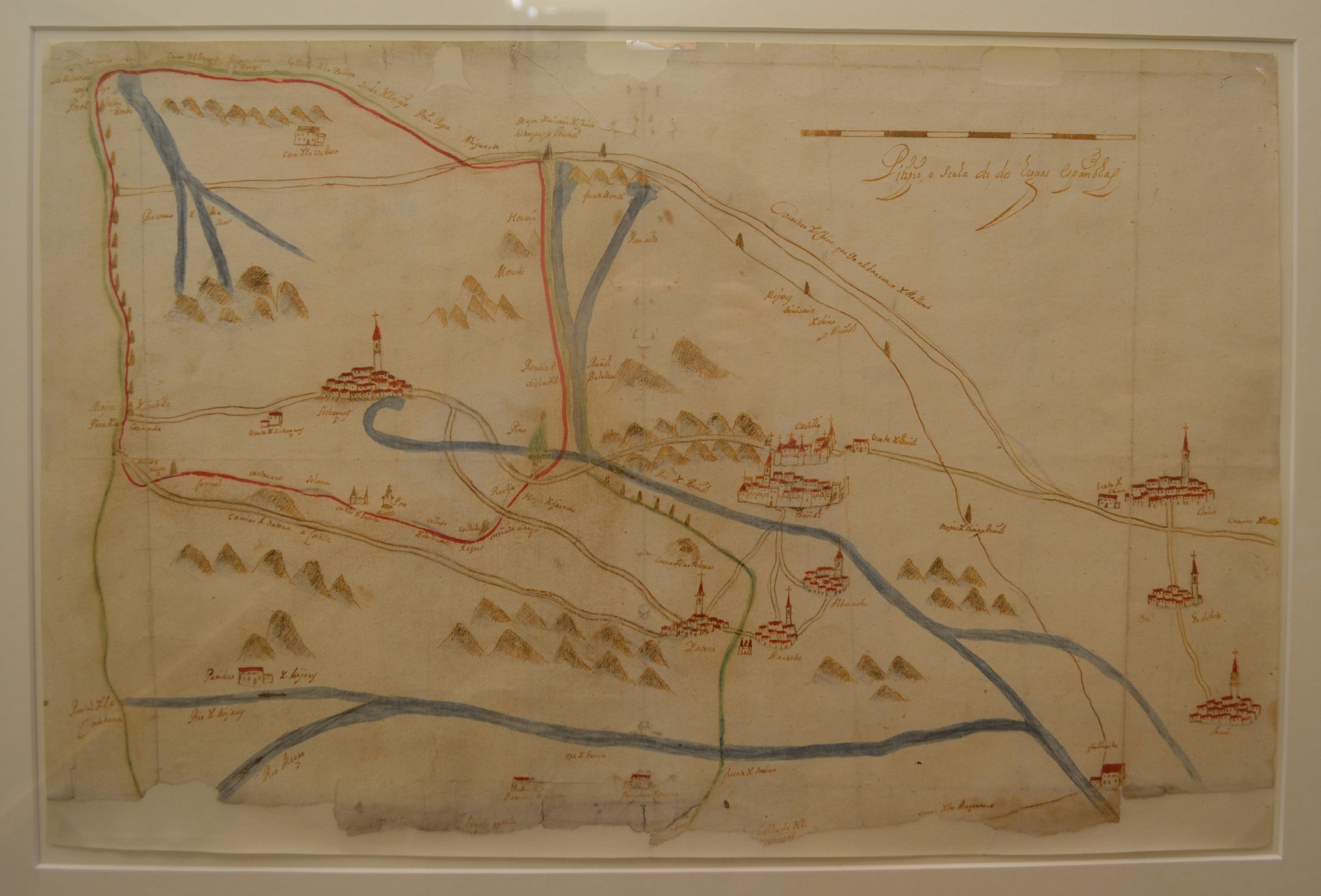 Mapa dels termes municipals de Setaigües, Bunyol, Xiva (Foia de Bunyol) i Macastre, amb vinyetes dels nuclis urbans i assenyalant els camins principals i els cursos d'aigua (1712). ARV: Mapes i plànols, núm. 260. Arxiu del Regne de València.